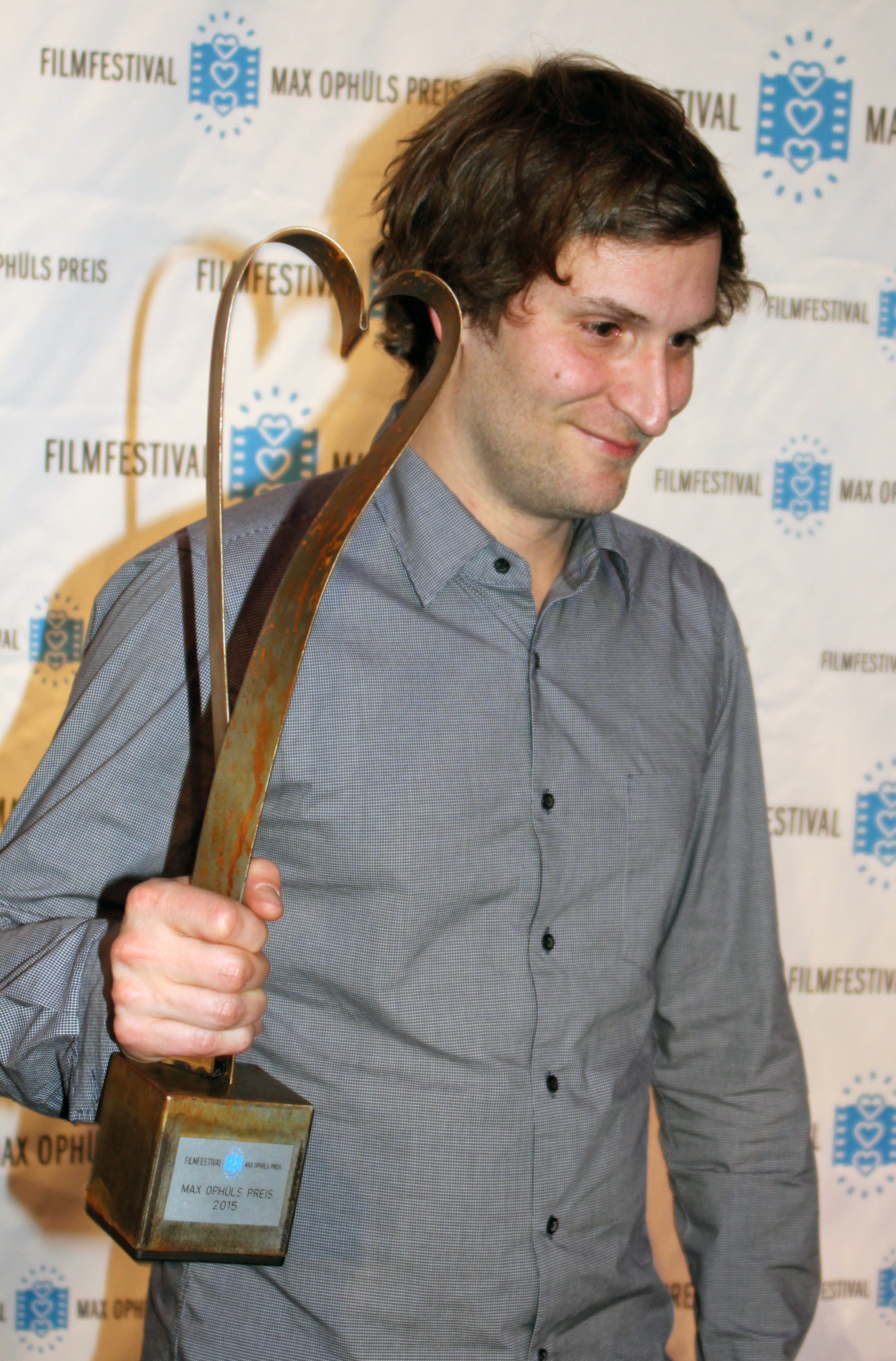 Simon Jaquemet nach der Preisverleihung des Max-Ophüls-Preis 2015